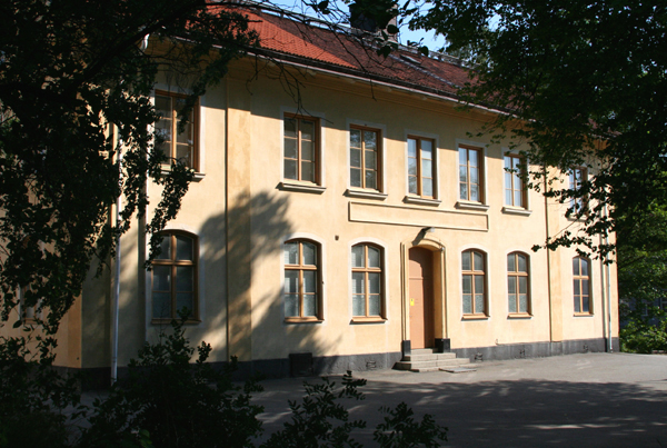 Atelier Stockholm Exteriör